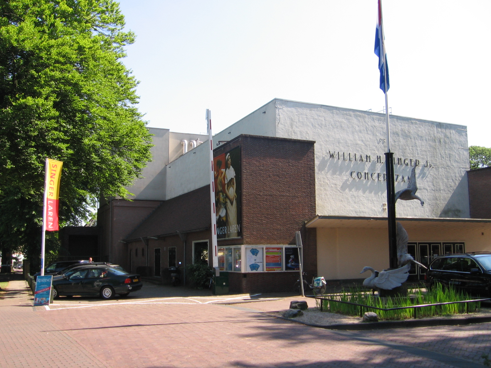 Singer museum and sculpture De Zwanen in Laren, June 2006